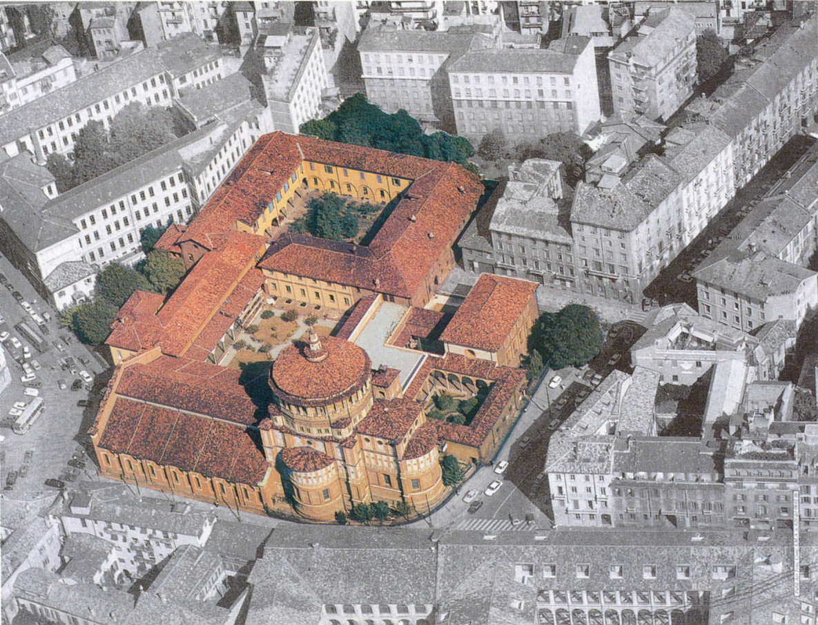 Српски (ћирилица): Манастирски комплекс